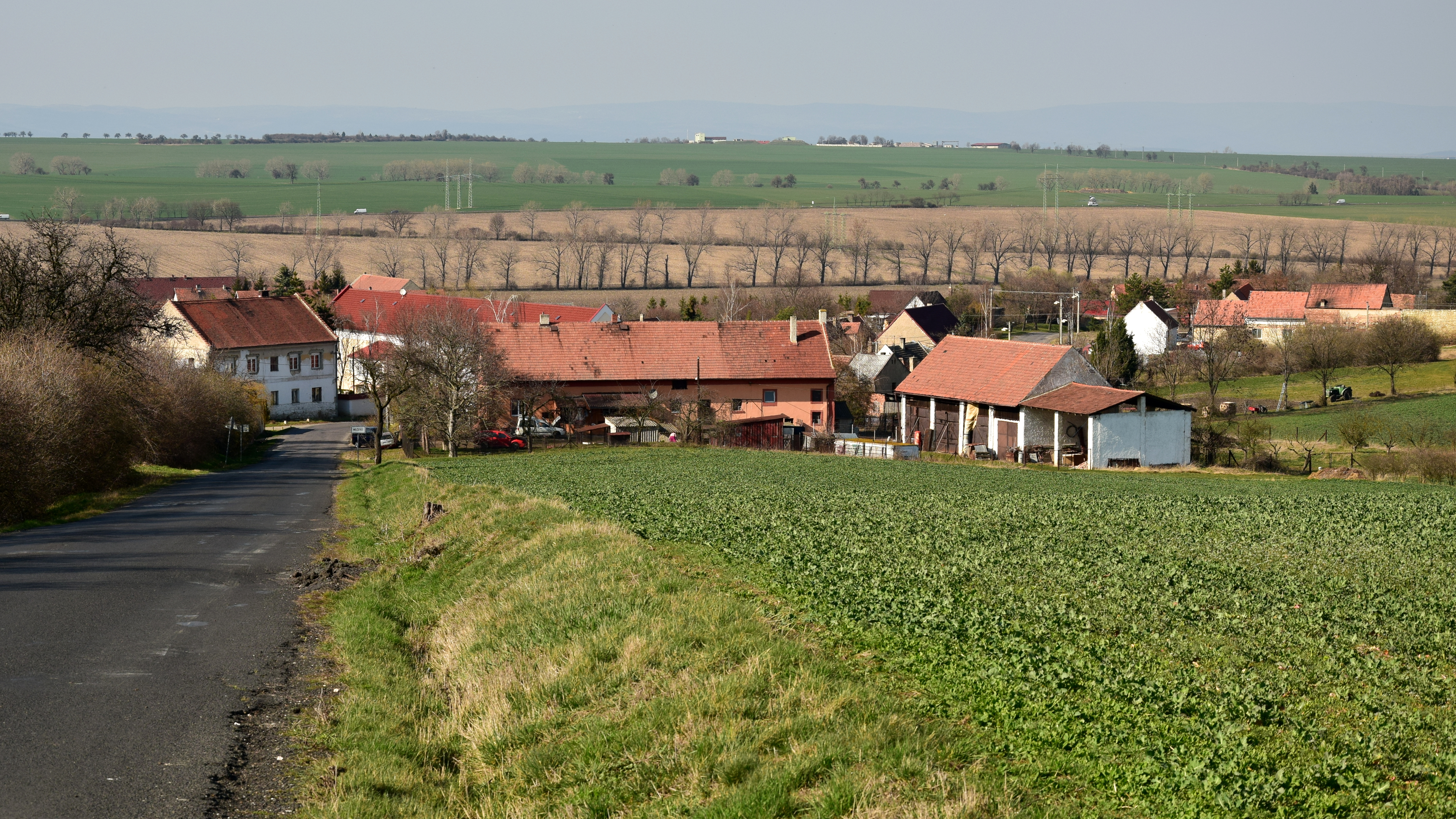 Milčeves – pohled od jihu